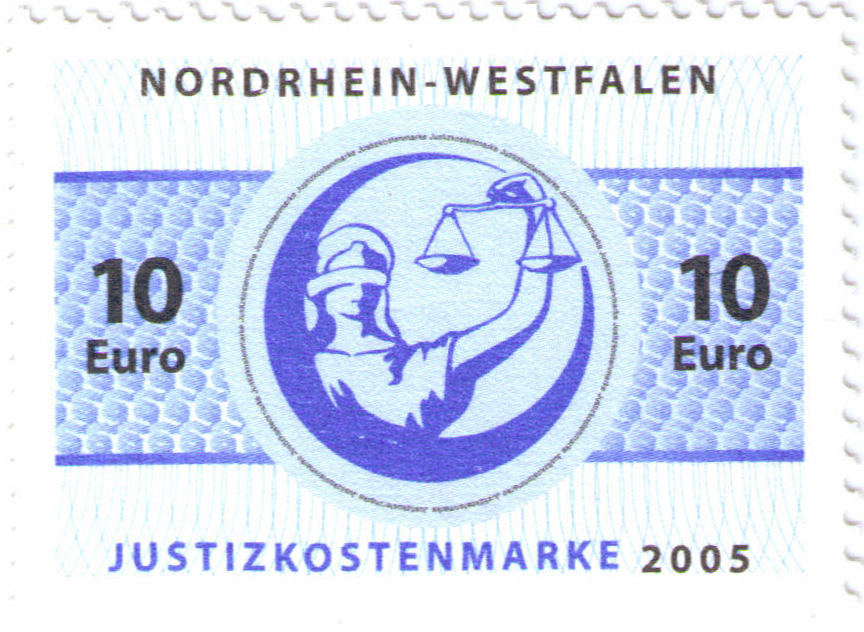 Kostenmarke aus Nordrhein-Westfalen, Wert 10 Euro